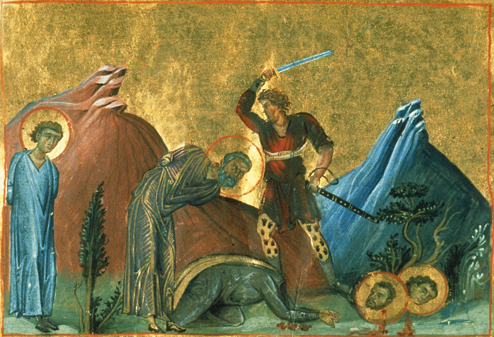 Мученики Назарий, Гервасий, Протасий и Келсий Константинополь. 985 г. Миниатюра Минология Василия II. Ватиканская библиотека. Рим.